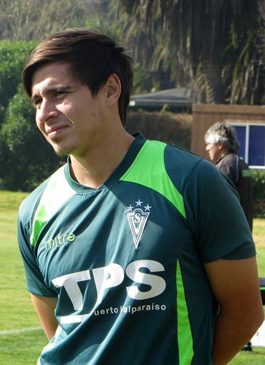 Fotografía de Samuel Mendoza, jugador profesional de fútbol durante un entrenamiento.